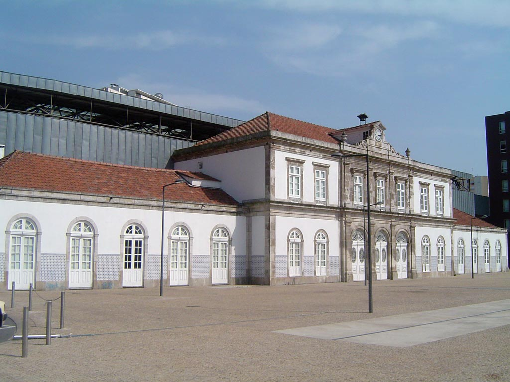 Antiga estação de comboios de Braga, encrostada na nova estação.